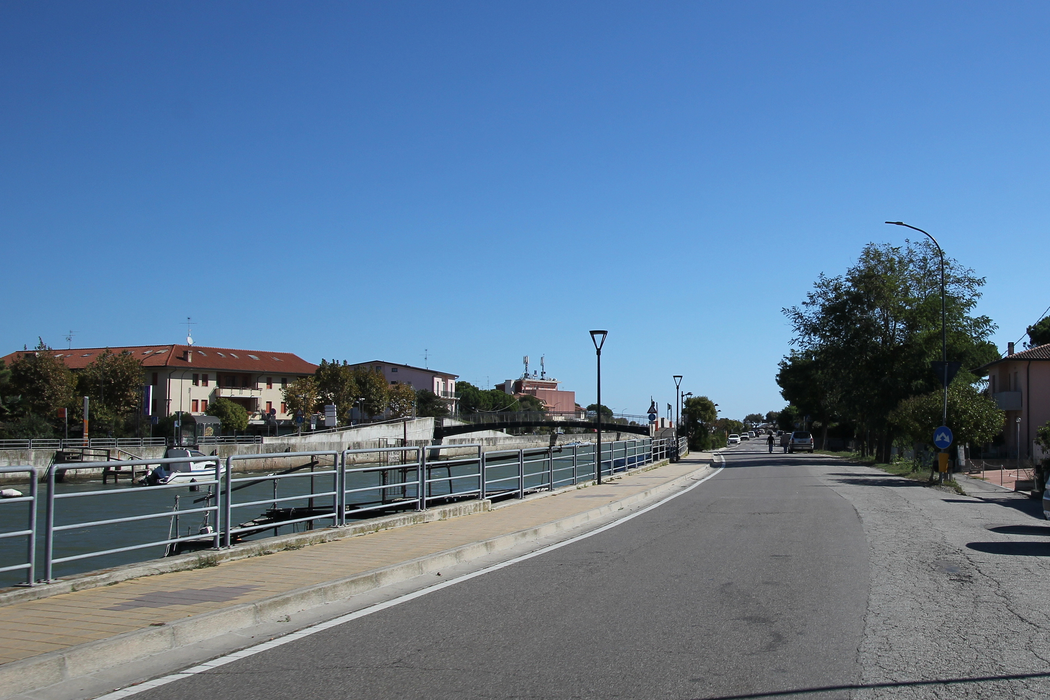 Ravenna, frazione Casal Borsetti